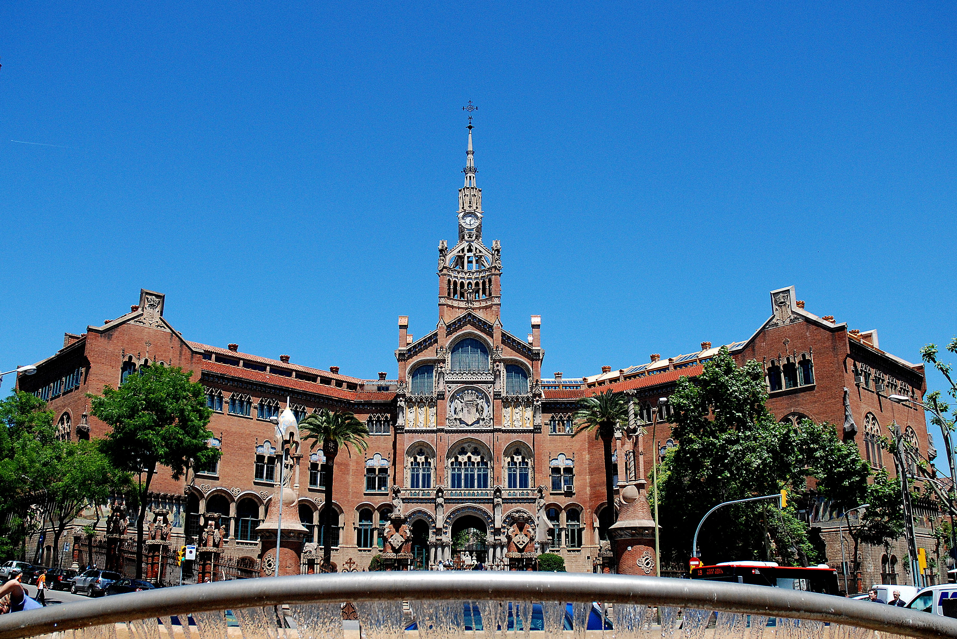 Hospital de la Santa Creu i Sant Pau in Barcelona